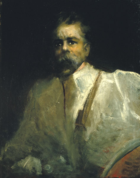 Self-portrait Aleix Clapés